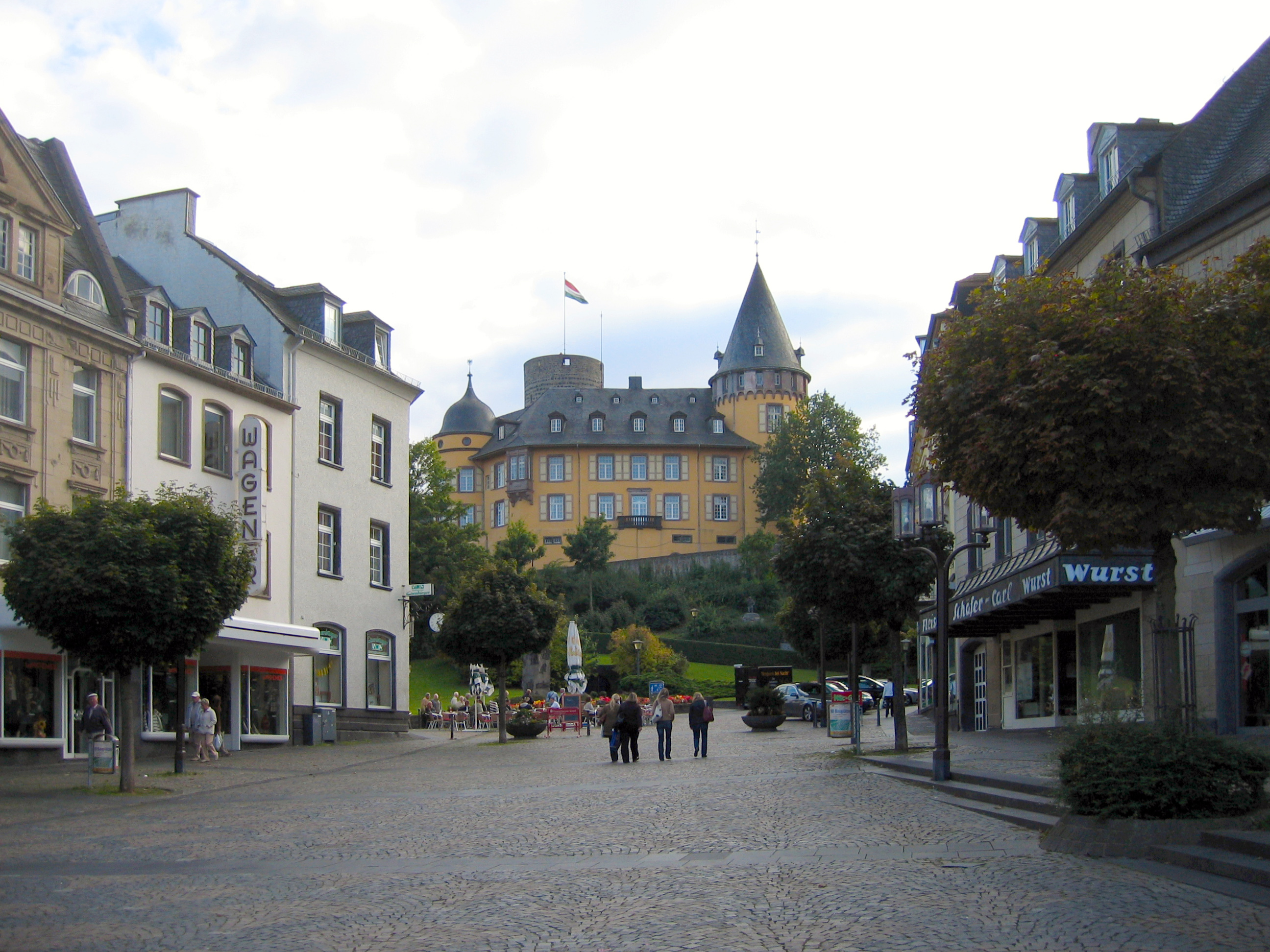 Der Marktplatz in Mayen mit Blick auf die Genovevaburg